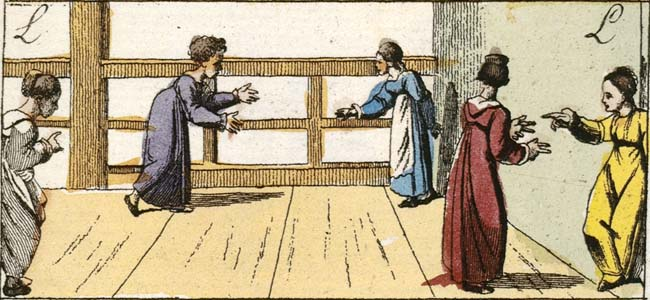 Das Fangspiel